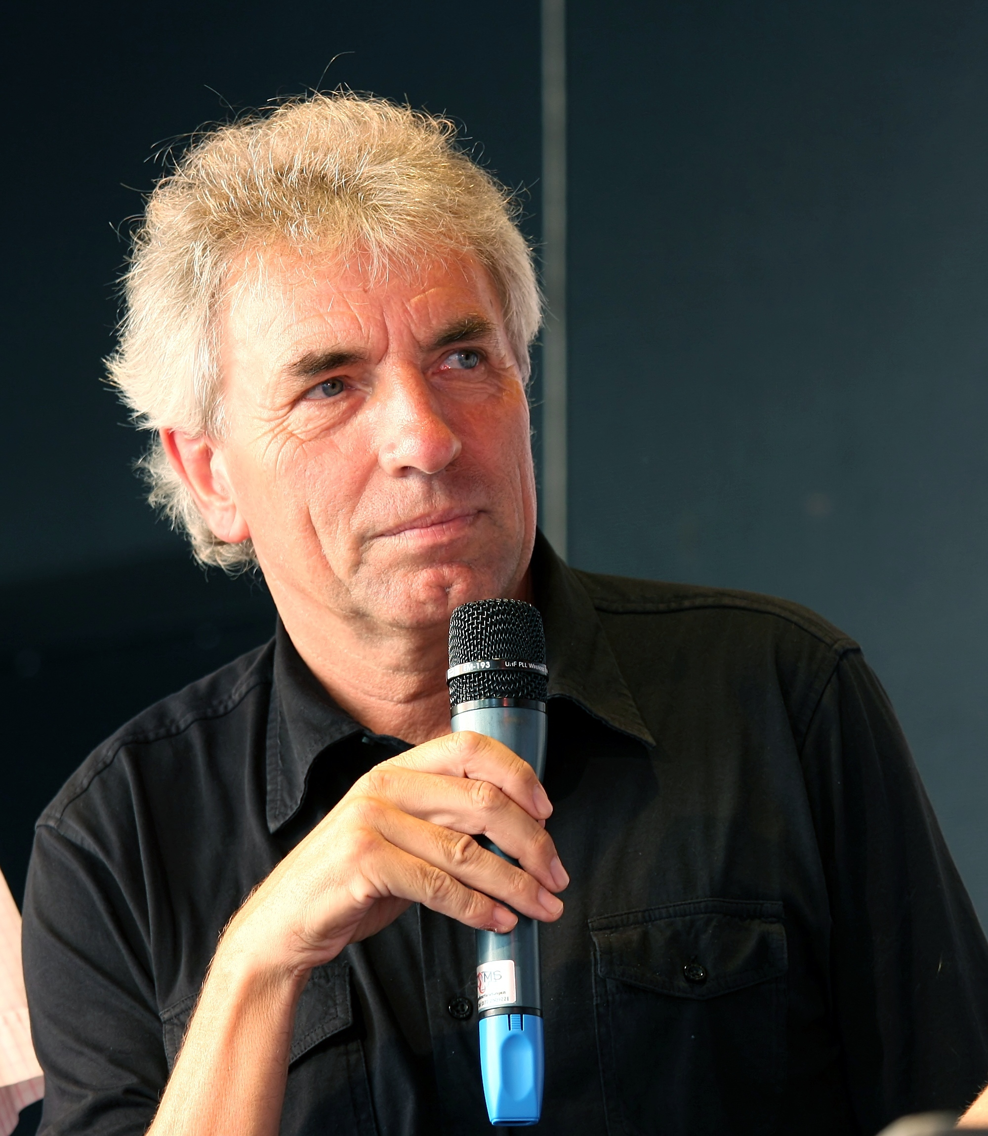 Jürgen Roters beim „Kandidaten-Check zur Kommunalwahl 2009“ auf der Politur-Bühne „Politik trifft Kultur“ auf dem Alter Markt, Köln. Bühnenprogramm zum CSD-Straßenfest/ColognePride 2009.